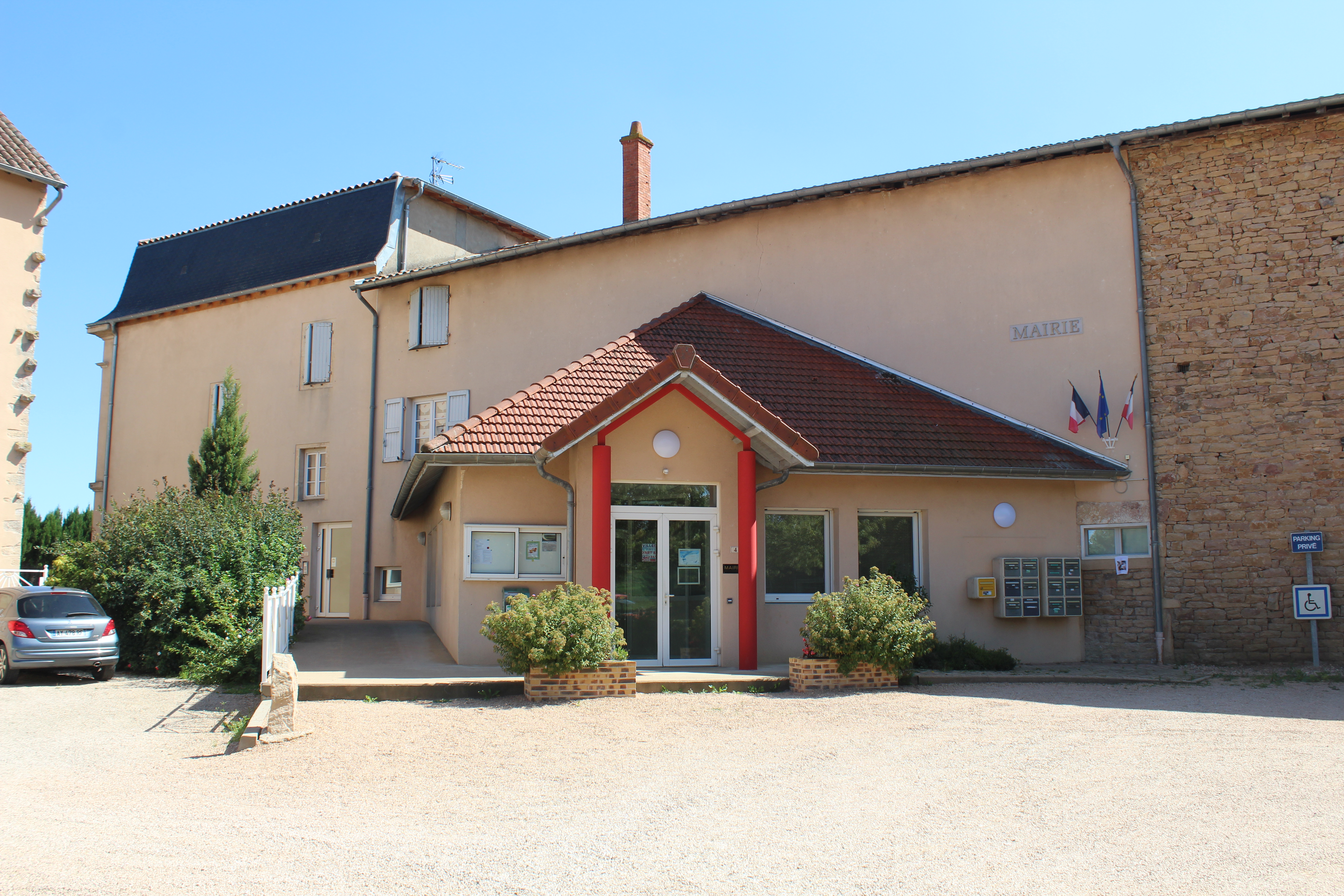 Mairie de Saint-Albain.